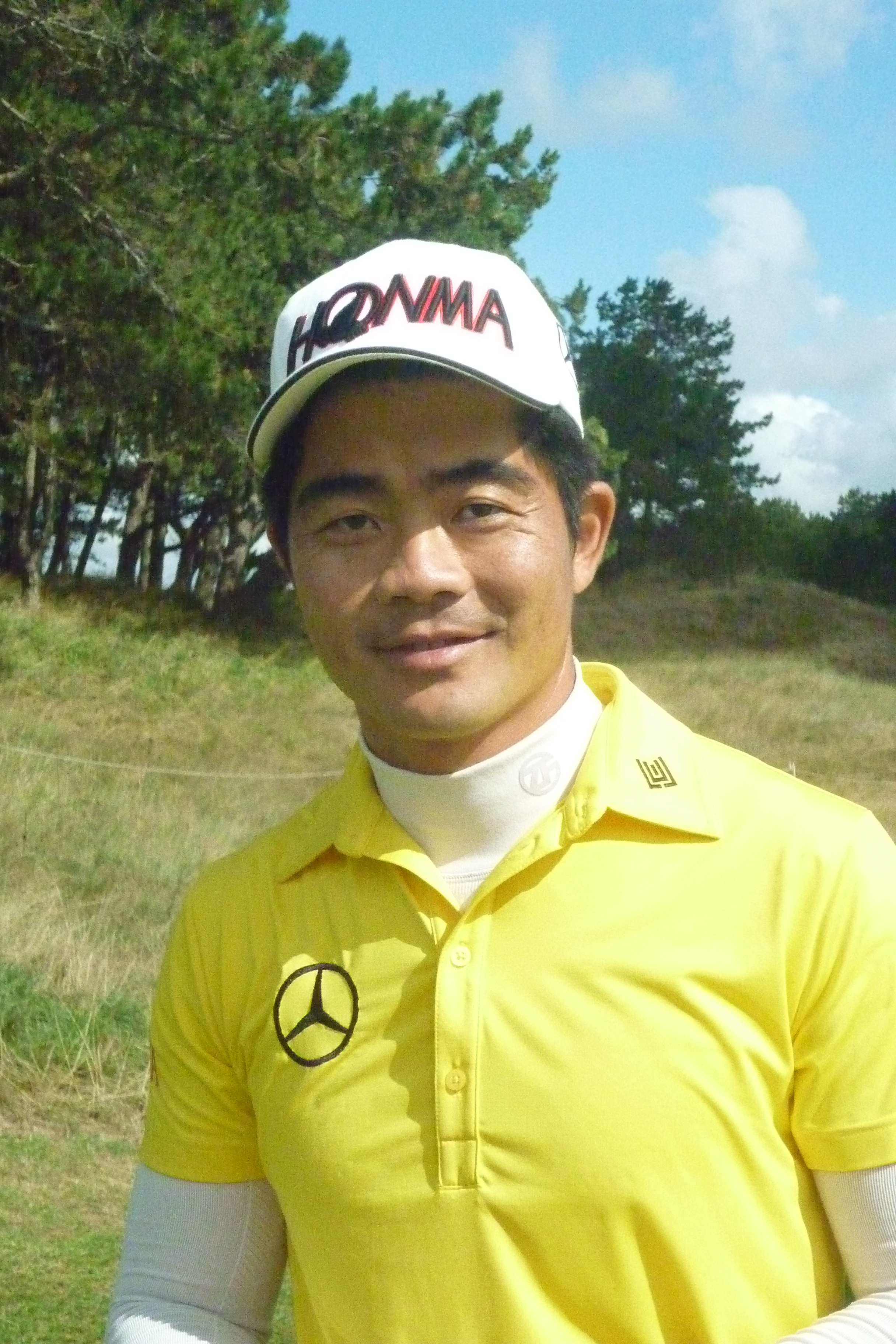 Won-Cheng Liang